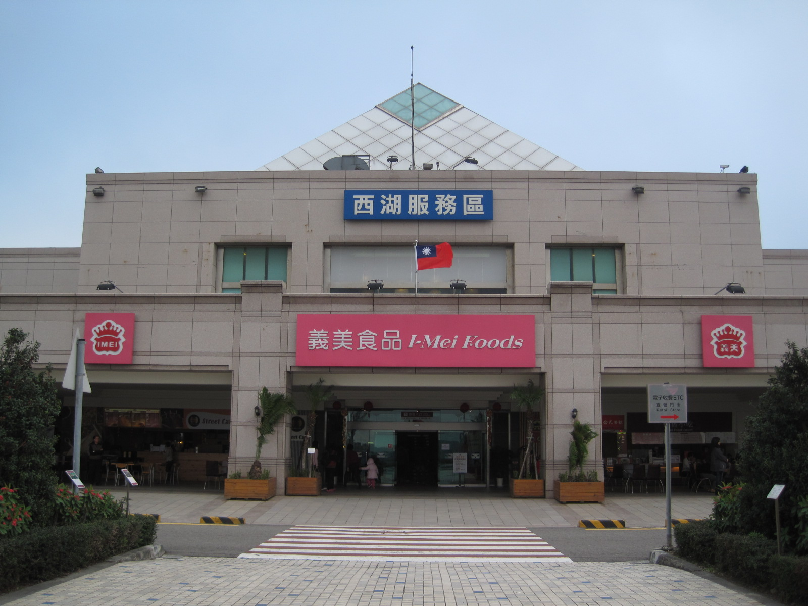 南下方向的西湖服務區